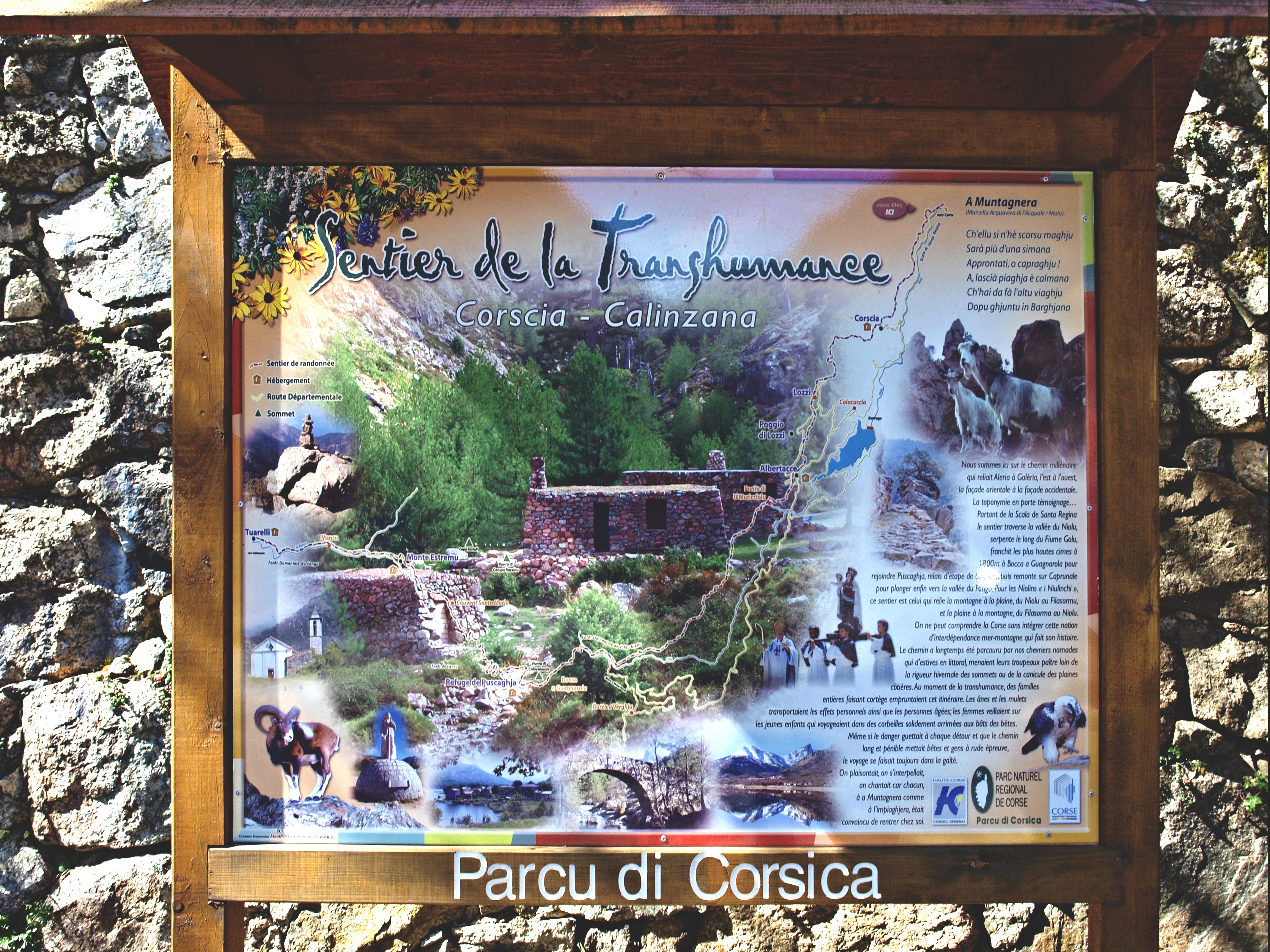 Corscia (Corsica) - Le Sentier de la Transhumance